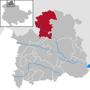 Stadt Ellrich in Thüringen, Landkreis Nordhausen